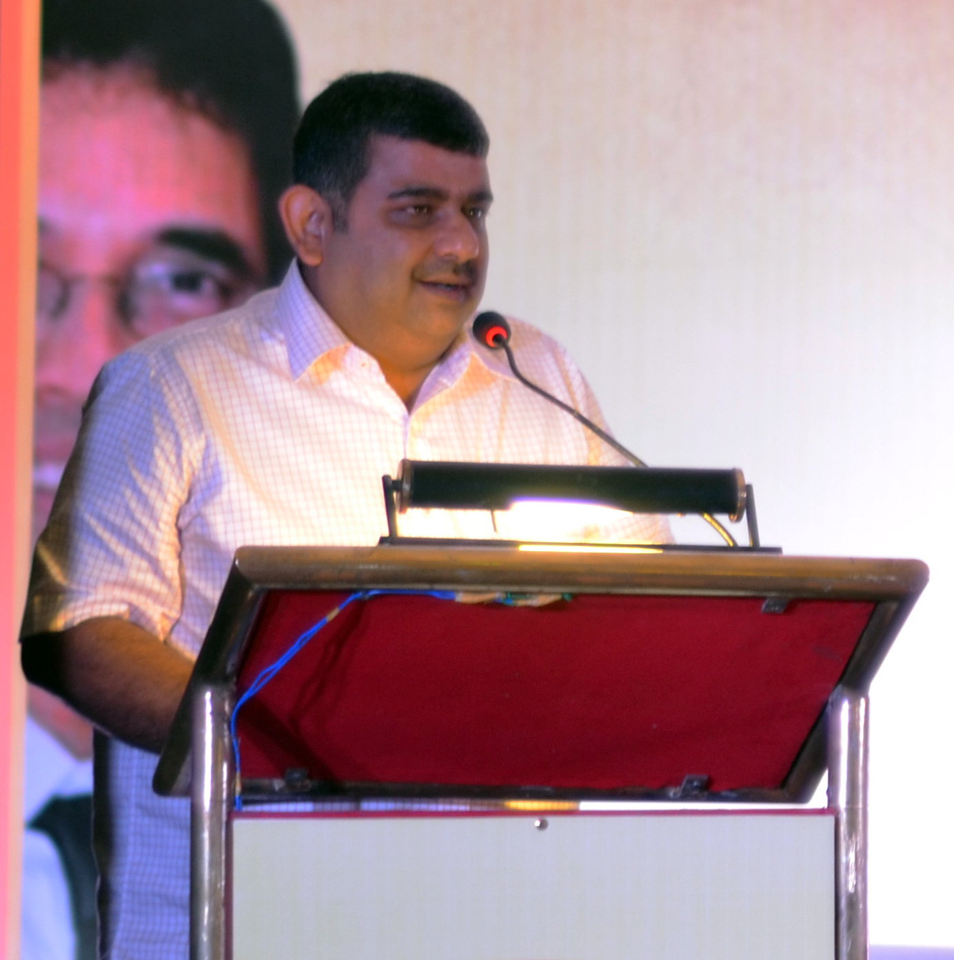 ଓଡ଼ିଆ: ଭାରତୀୟ କ୍ରିକେଟ ଖେଳାଳି ଓ ଗଣନେତା ରଞ୍ଜୀବ ବିଶ୍ୱାଳ । ଏହି ଫଟୋ ଦୈନିକ ଓଡ଼ିଆ ଖବରକାଗଜ ସମ୍ବାଦର ୩୦ ବର୍ଷ ପୂରଣ ପାଳନ ବେଳେ ଉଠାଯାଇଥିଲା ।